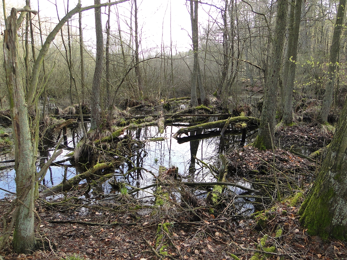 Naturschutzgebiet Gruber Forst südlich Teterow, Mecklenburg-Vorpommern. - OpenStreetMap (Info)